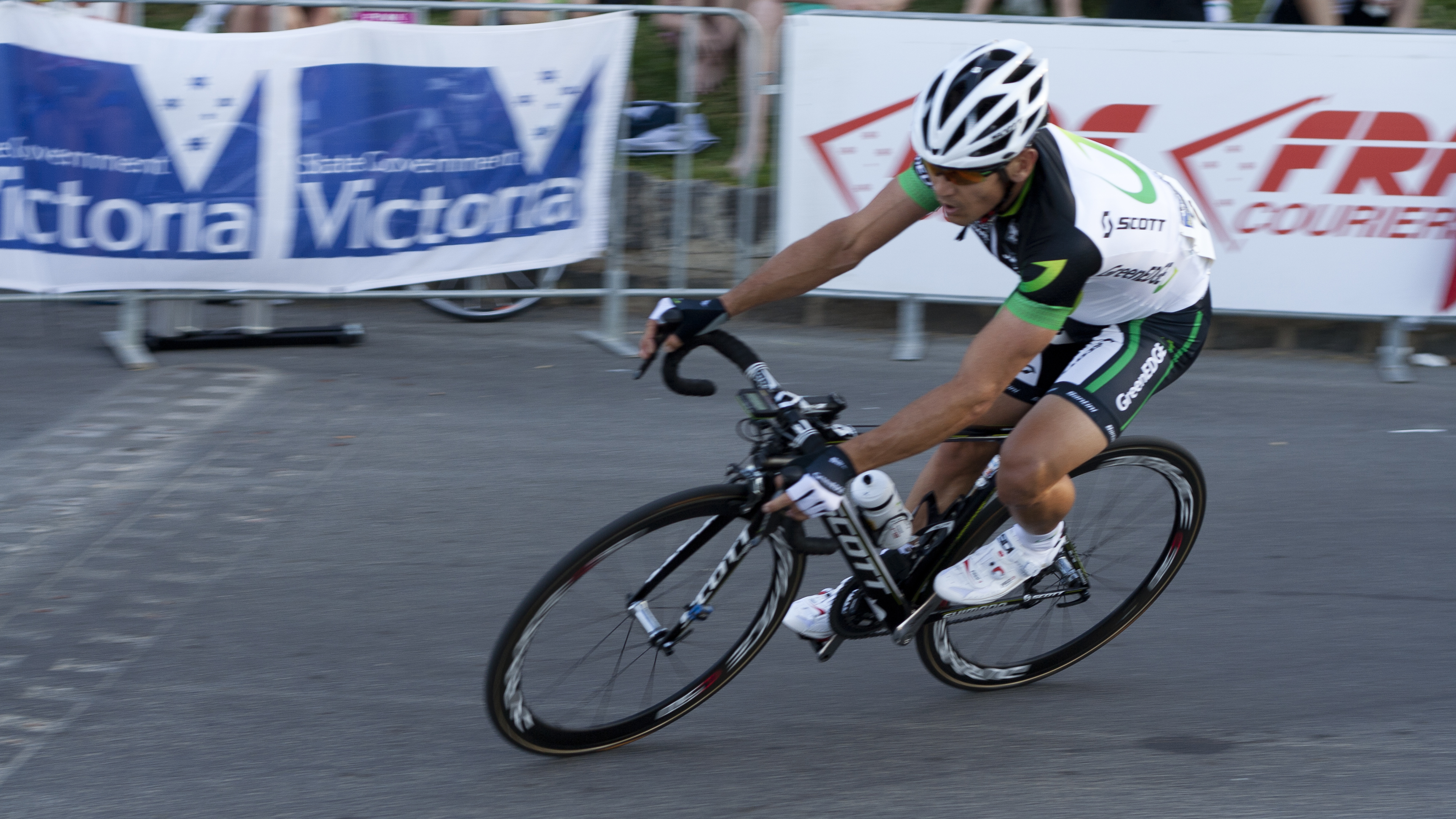 Robbie McEwen debutando con el maillot del GreenEdge Cycling Team en la Jayco Bay Cycling Classic 2012